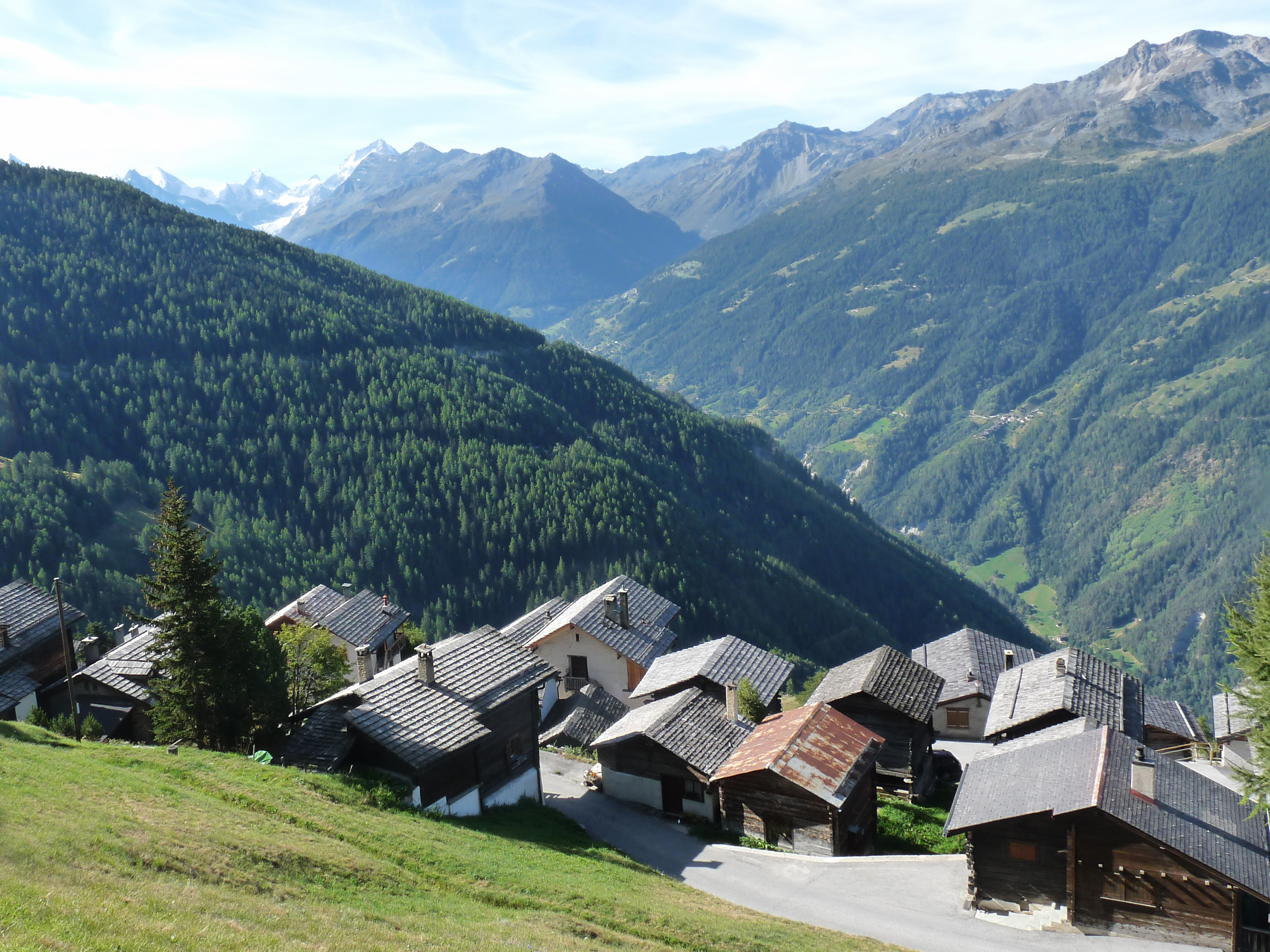 Chandolin (Valais, Suisse) : chalets accrochés à la montagne